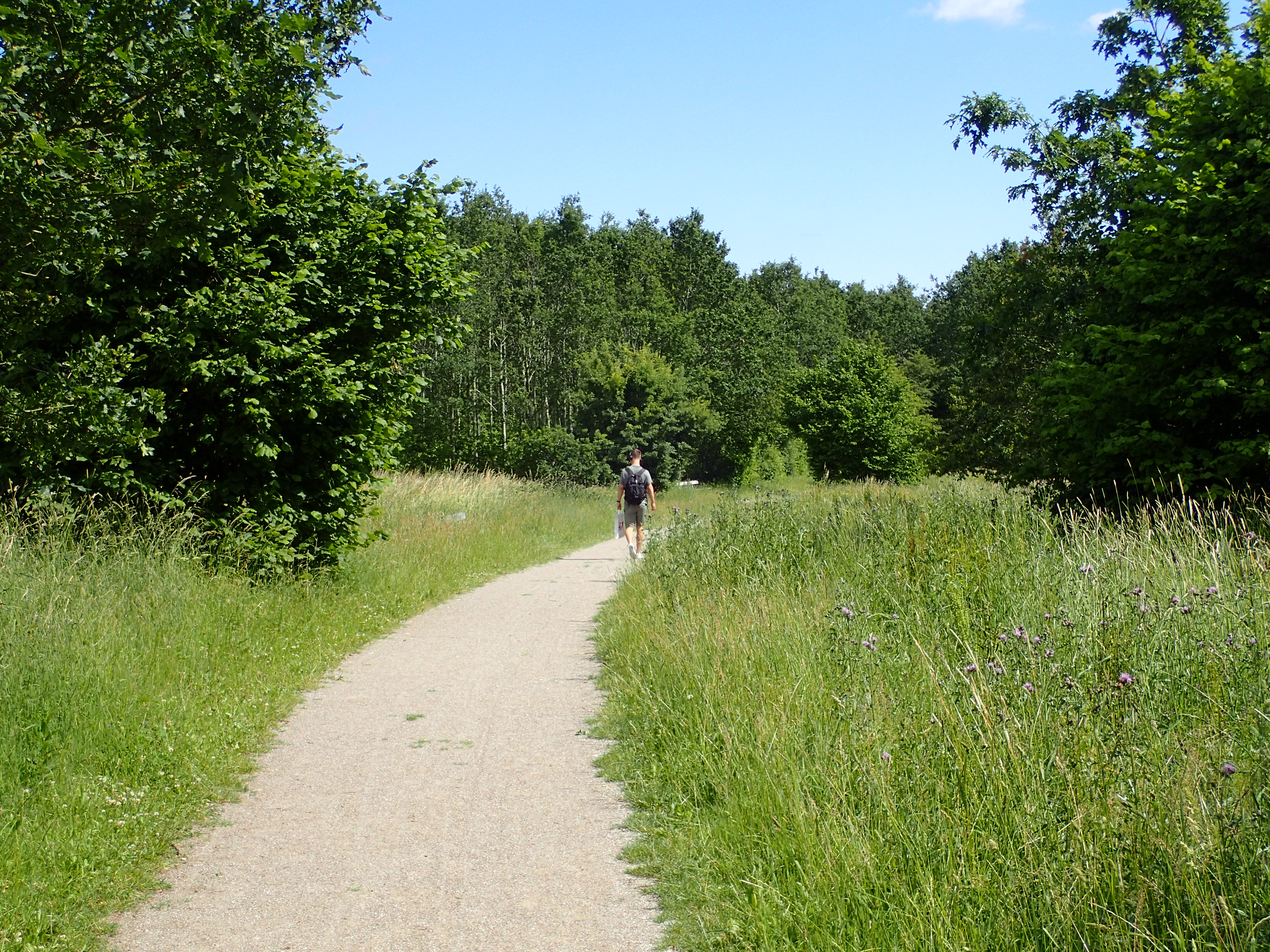 Sti gennem Gellerup Skov